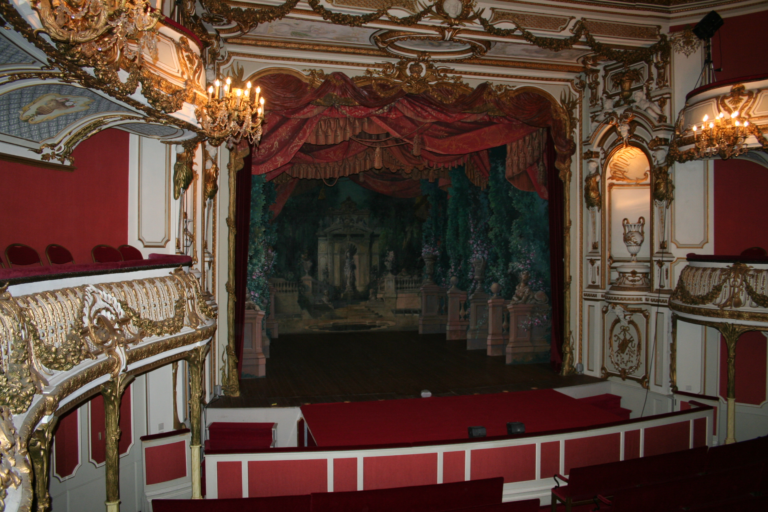 Chimay, le petit théatre de madame Tallien - Château de Chimay.